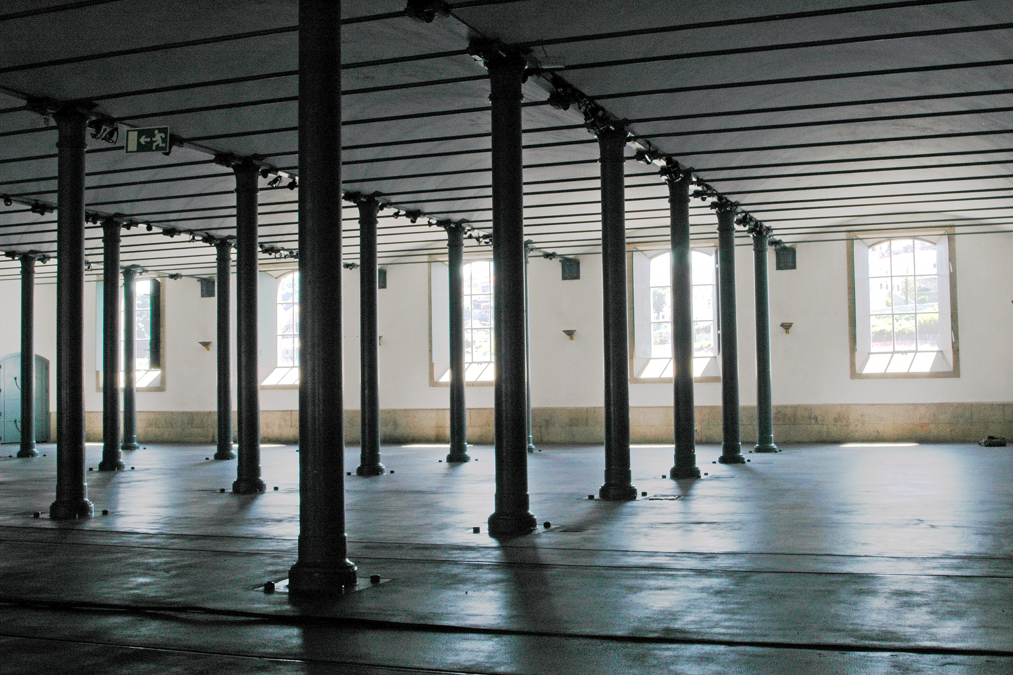 Alfândega Nova - Sala de exposições This file was uploaded for Wiki Loves Monuments in Portugal with the unique identifier 70765.